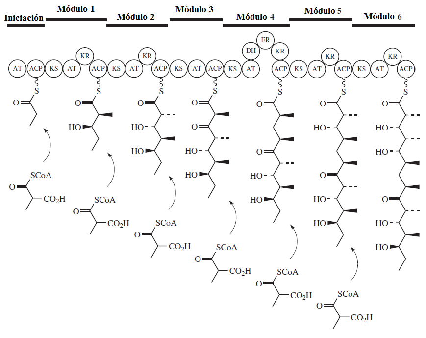 Representación esquemática de las Policétido Sintasas tipo I modulares.